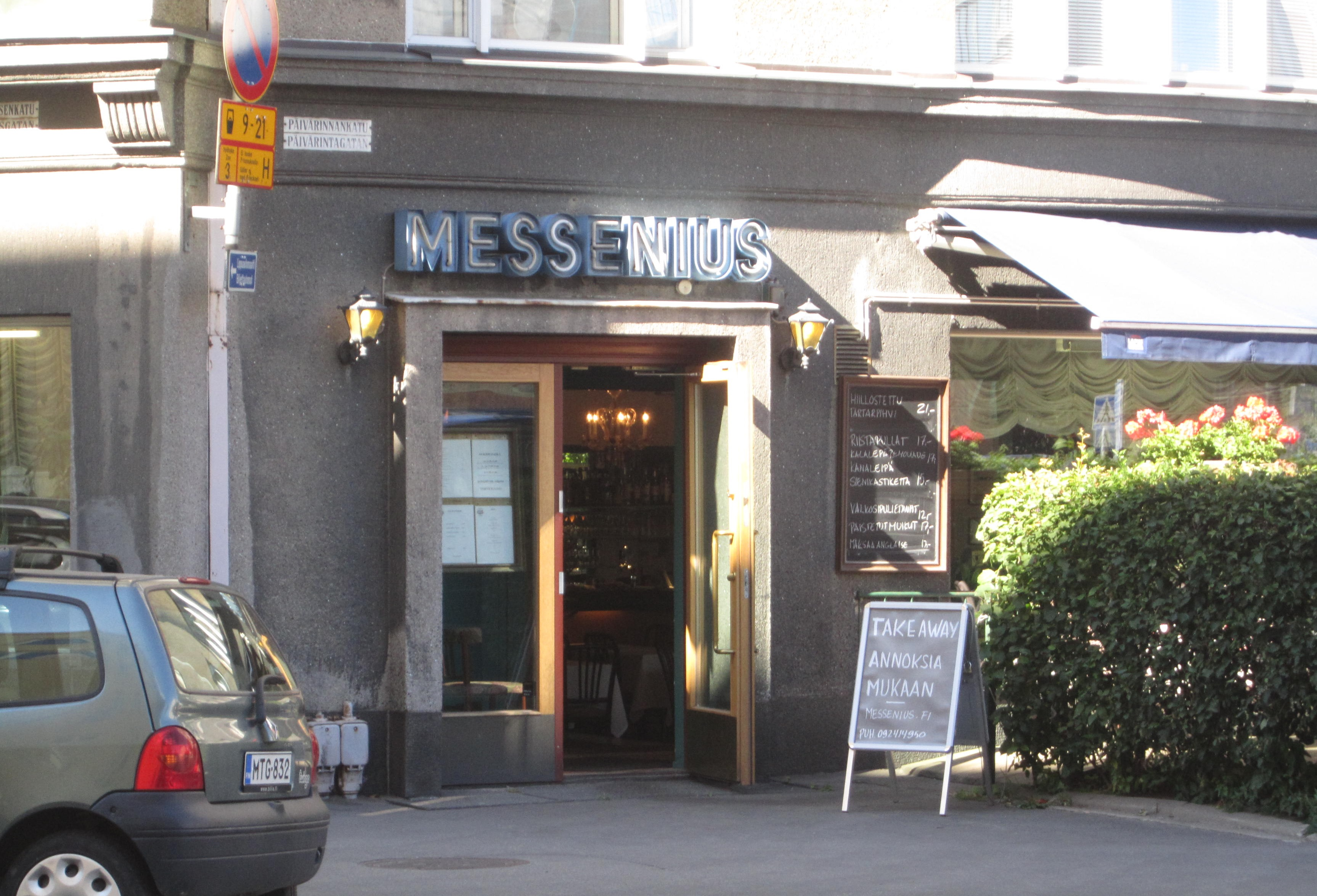 Ravintola Messenius Helsingissä.